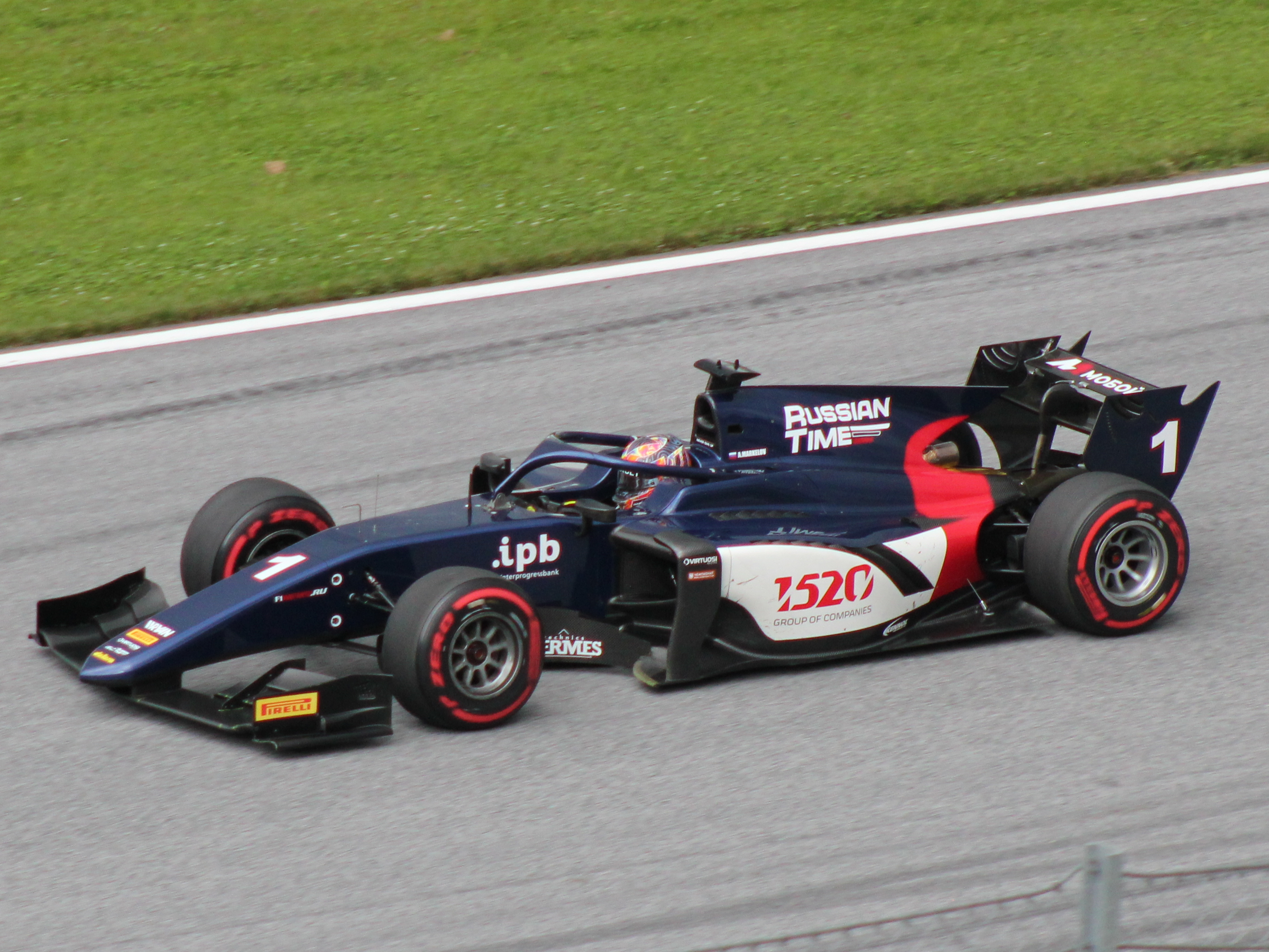 #01 Artem Markelov beim Rennwochenende in Österreich 2018